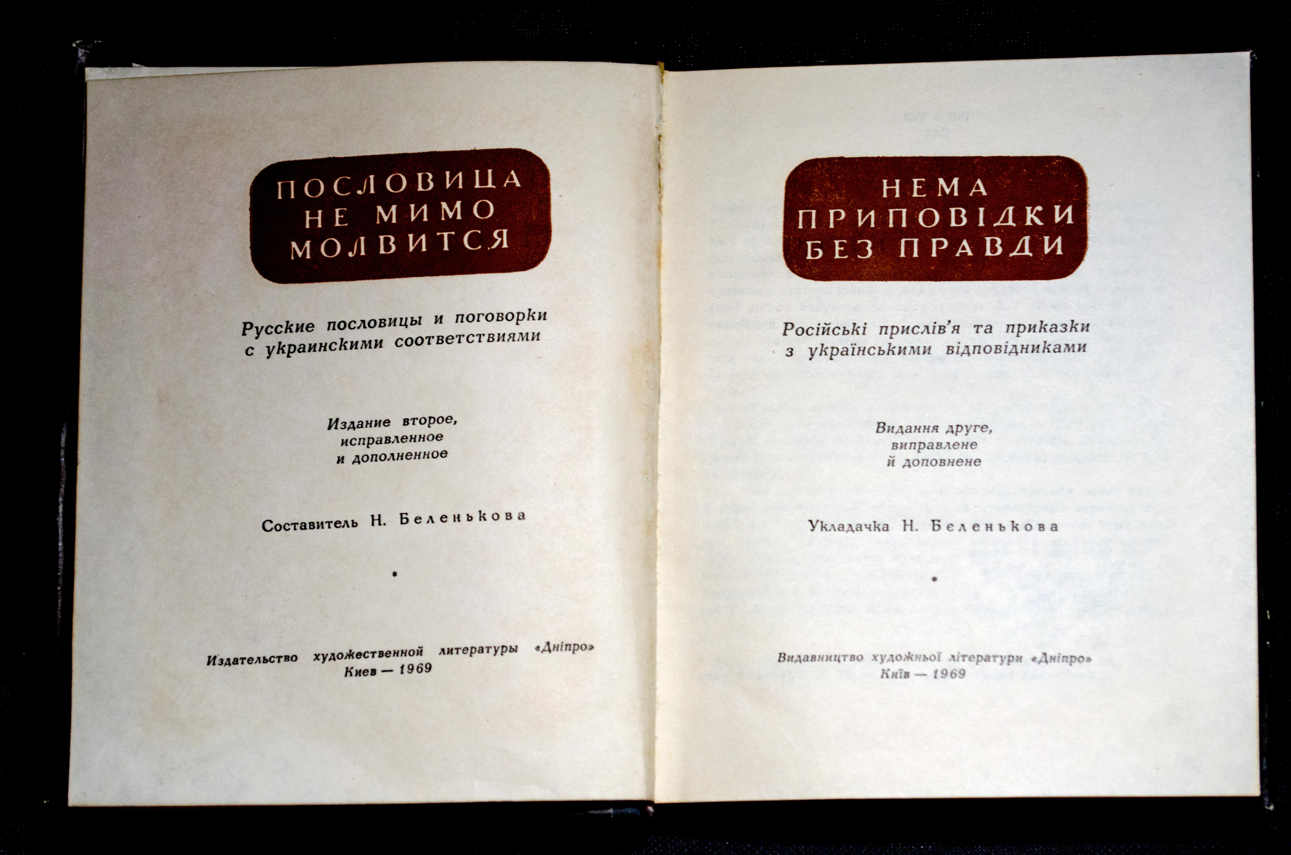 Книга російських прислів'їв та приказок та їх українських відповідників